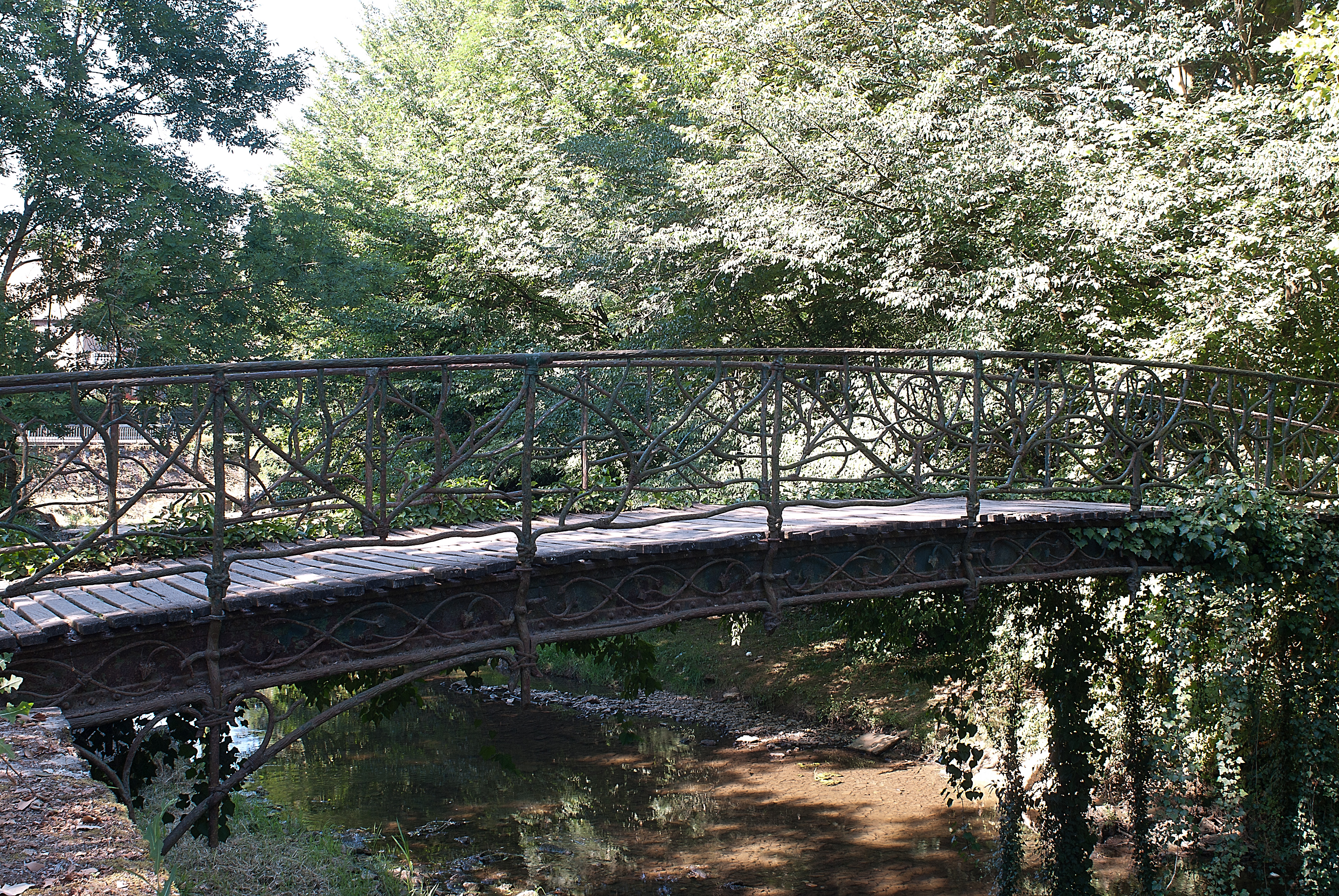 Pont menant au Jardin Anglais de Vesoul